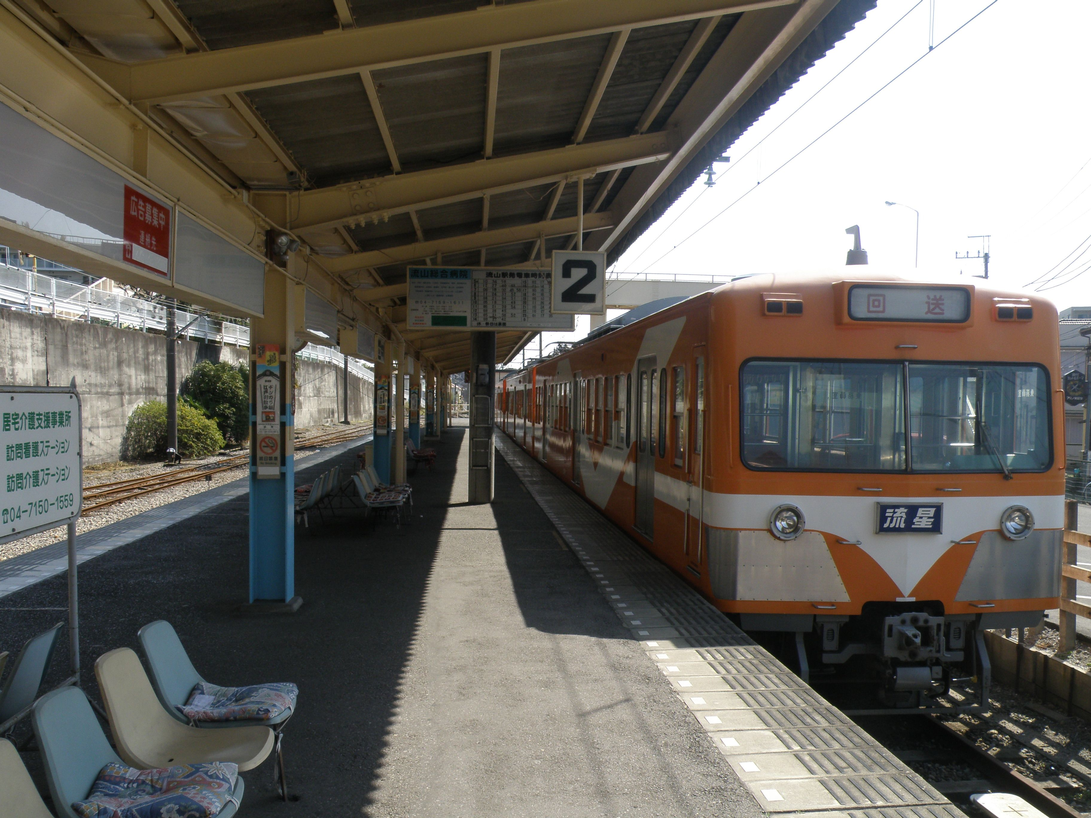 流山駅